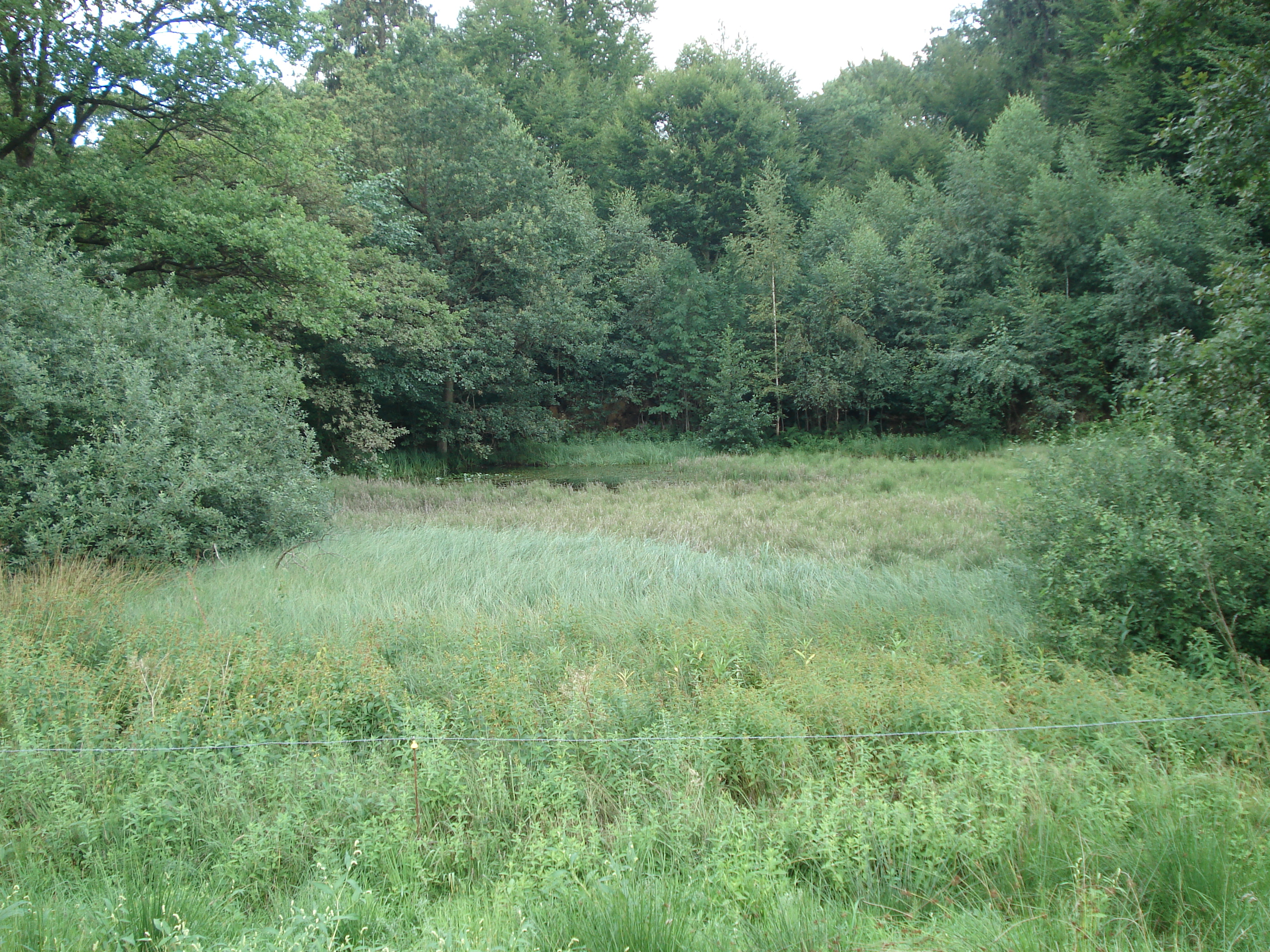 Im Naturschutzgebiet Teufelsbäder bei Osterode am Harz